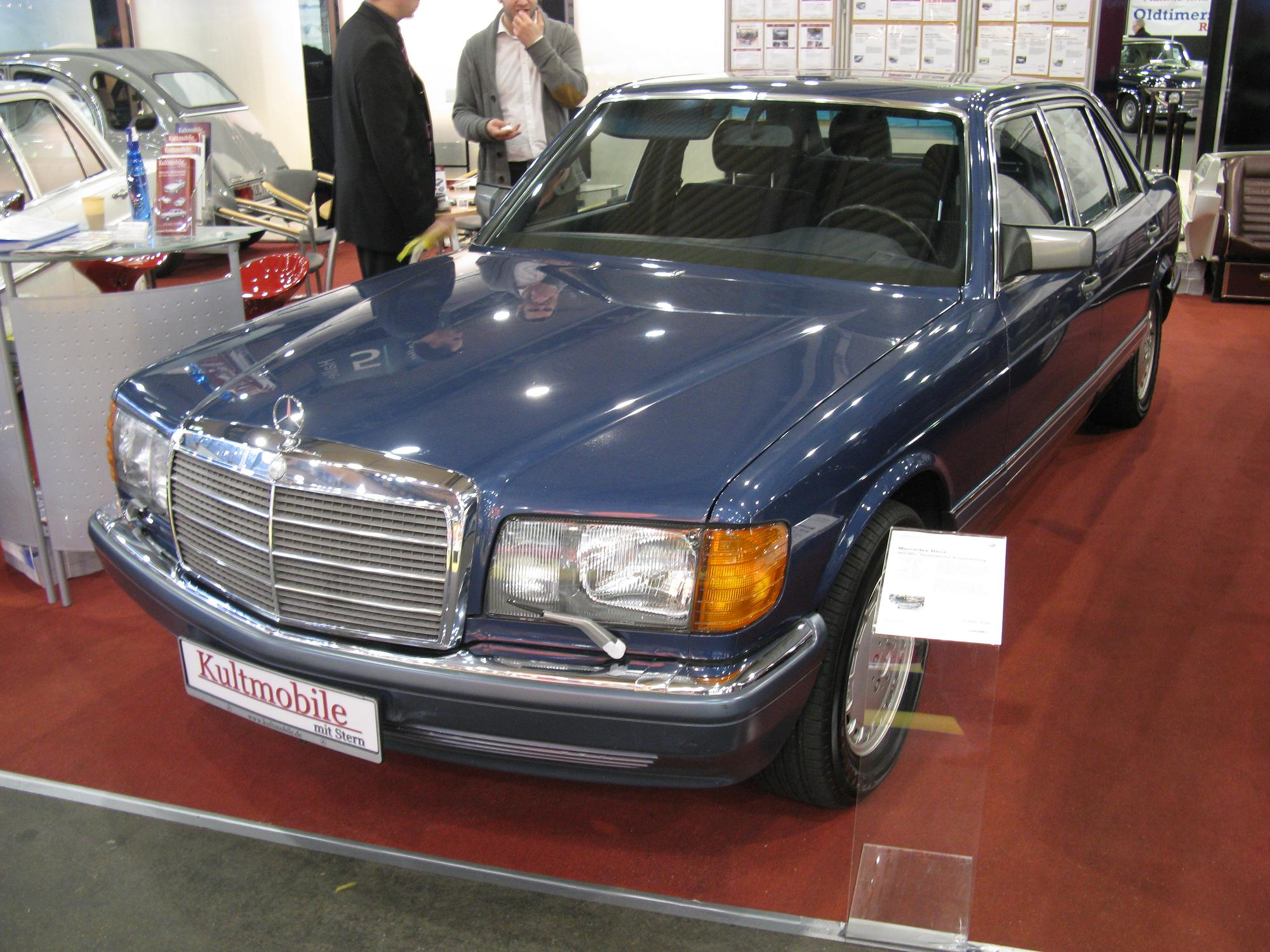 Mercedes-Benz 560 SEL